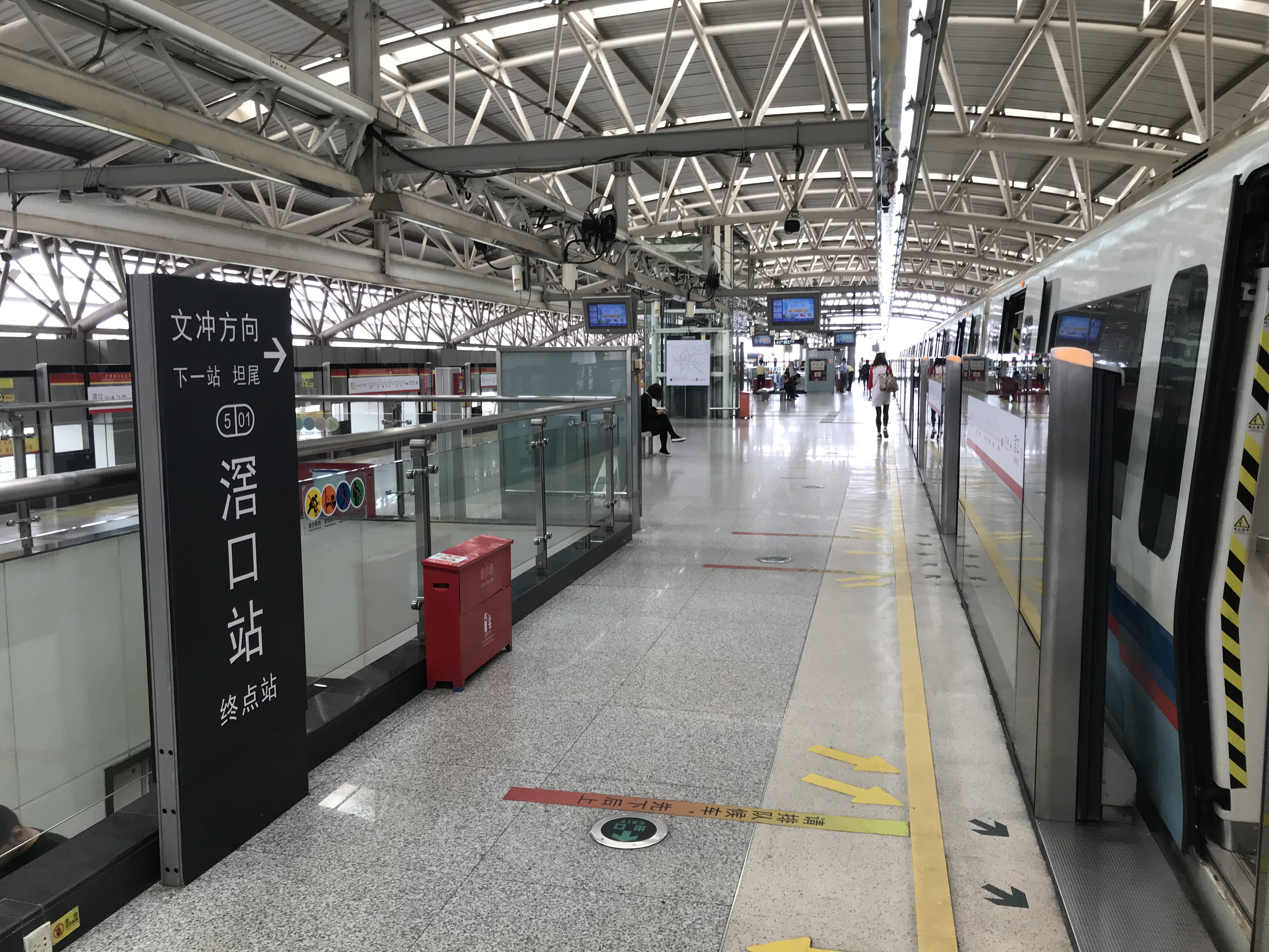 广州地铁滘口站